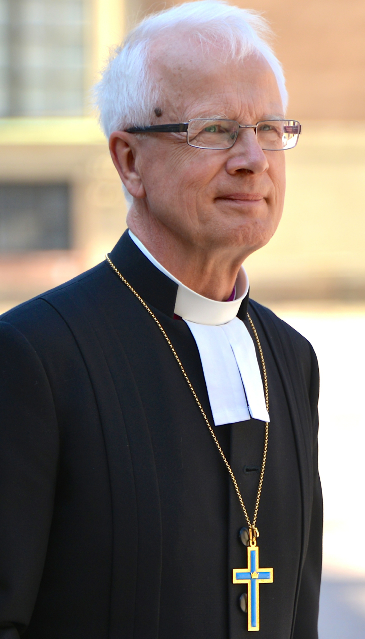 Lars-Göran Lönnermark på väg in till slottskyrkan på Kungliga slottet i Stockholm inför vigseln mellan prinsessan Madeleine och Christopher O’Neill den 8 juni 2013.